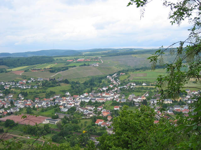 Blick über Serrig bei Saarburg